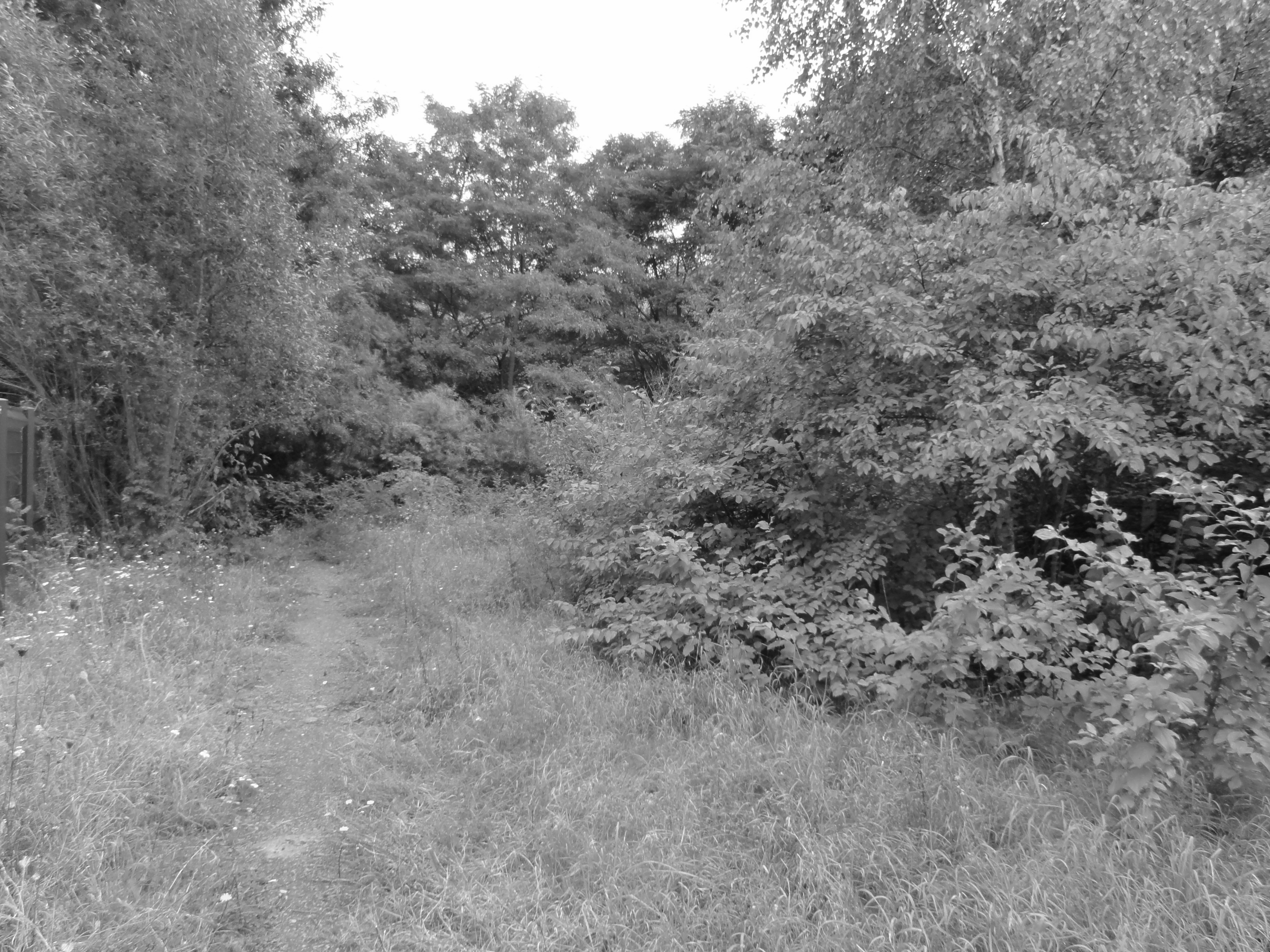 Terril n° 215 dit 4 de Liévin, fosse n° 4 - 4 bis de la Compagnie des mines de Liévin dans le bassin minier du Nord-Pas-de-Calais, Avion, Pas-de-Calais, Nord-Pas-de-Calais, France.